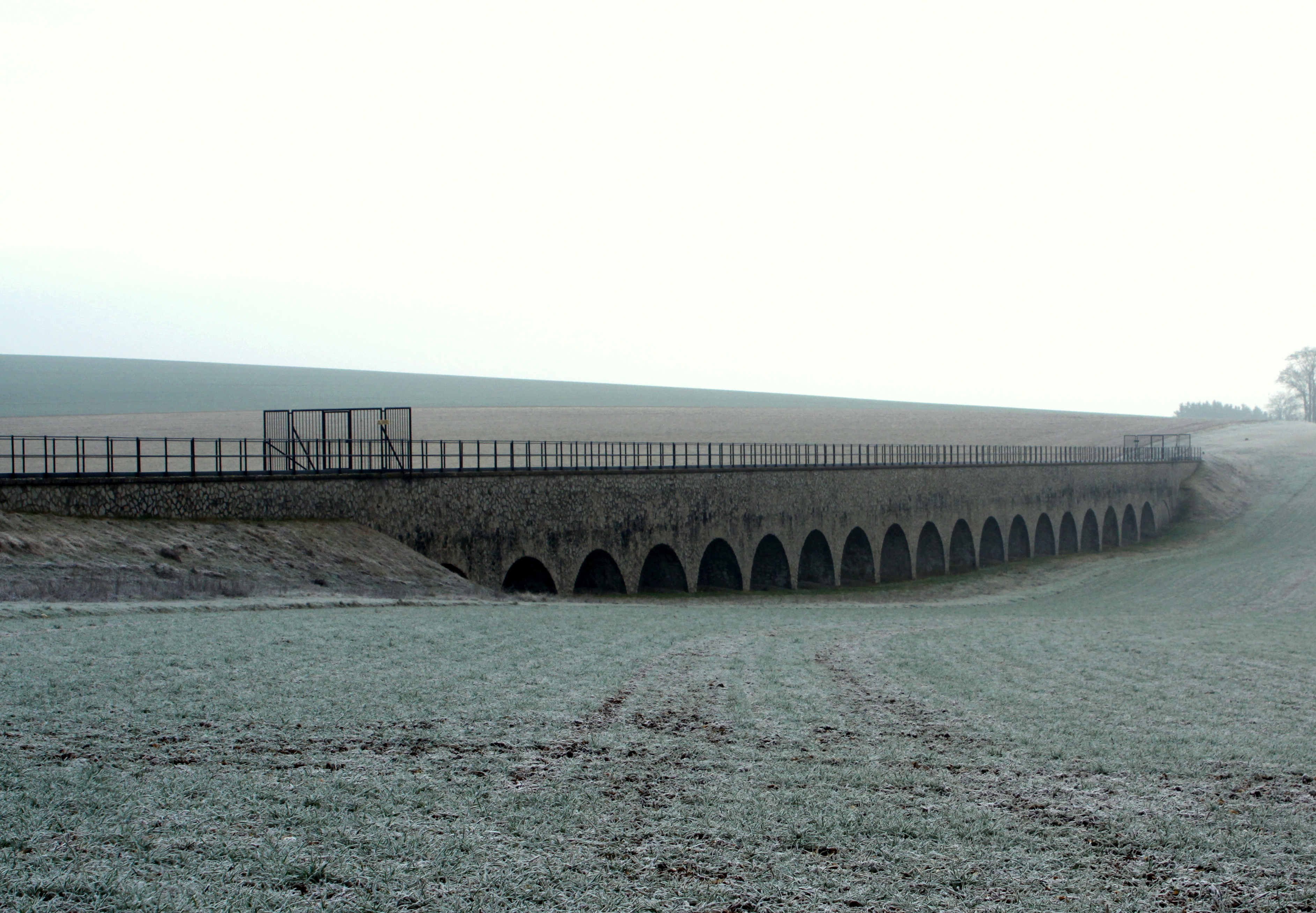 Aqueduc de la Vanne, les Arcades Beauregard.